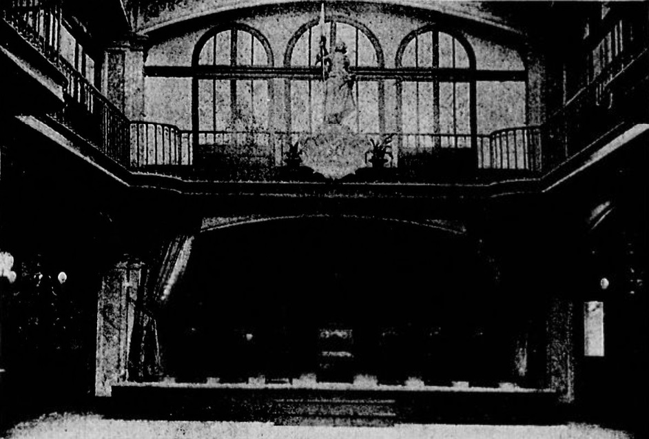 "Le 76, siège de l'A.C.J.F : vue intérieure." 76, rue des Saints-Pères, Paris.